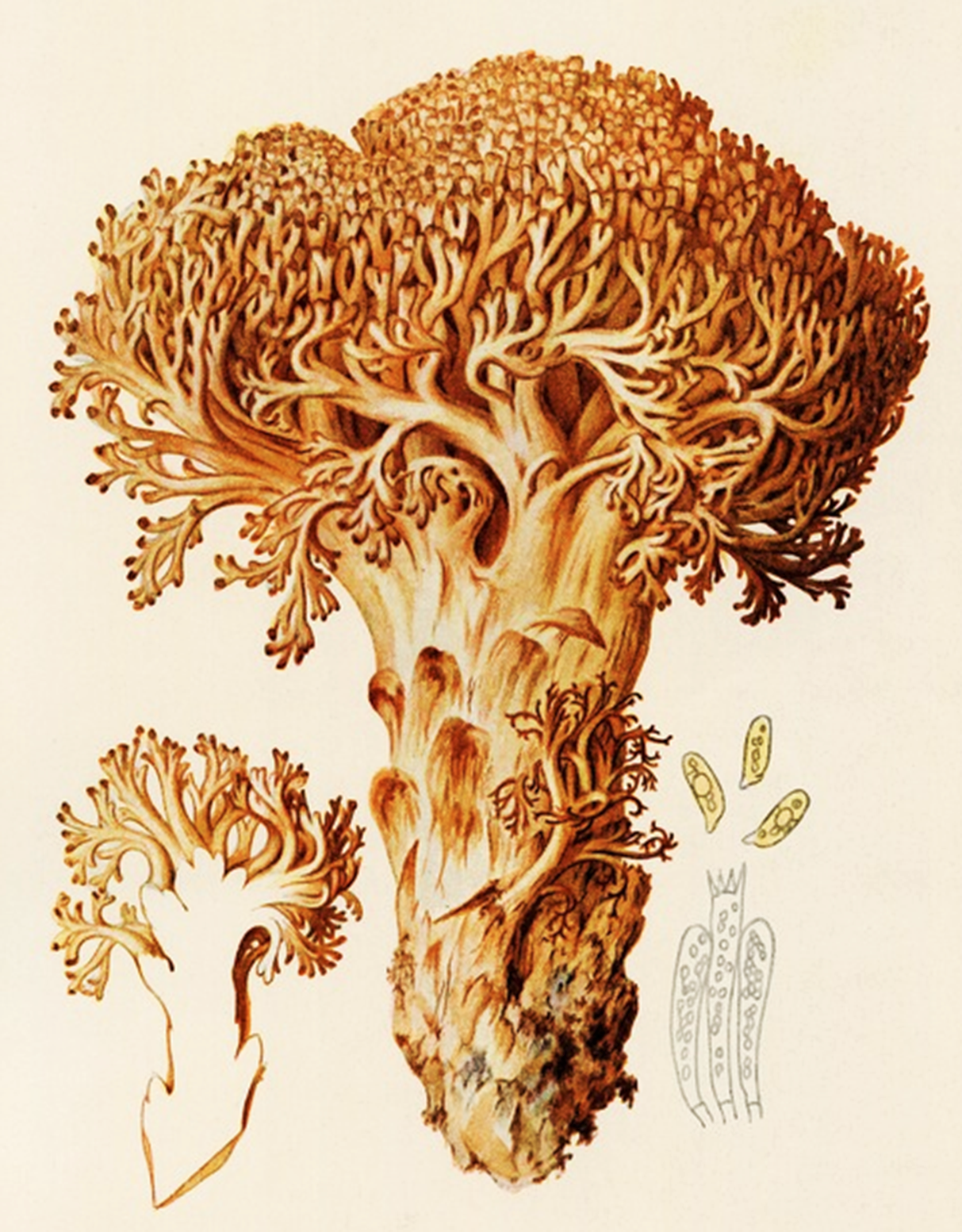 Bres.: Clavaria rufescens Schaeff. (1774), heute Ramaria rufescens Corner (1950)